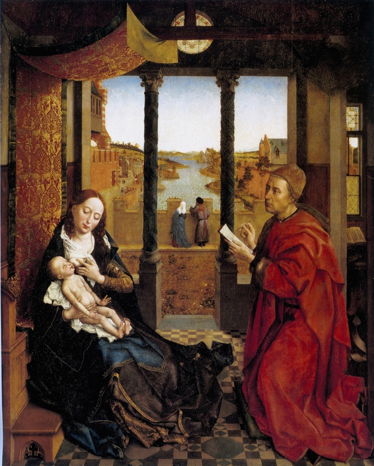 Rogier van der Weyden: Der hl. Lukas zeichnet die Madonna, 137x110cm, um 1440, Boston ,USA